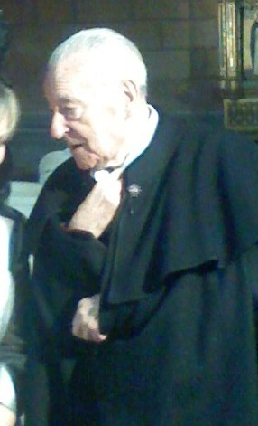 Blas Piñar, vestido con capa española, en la boda de una de su nieta.